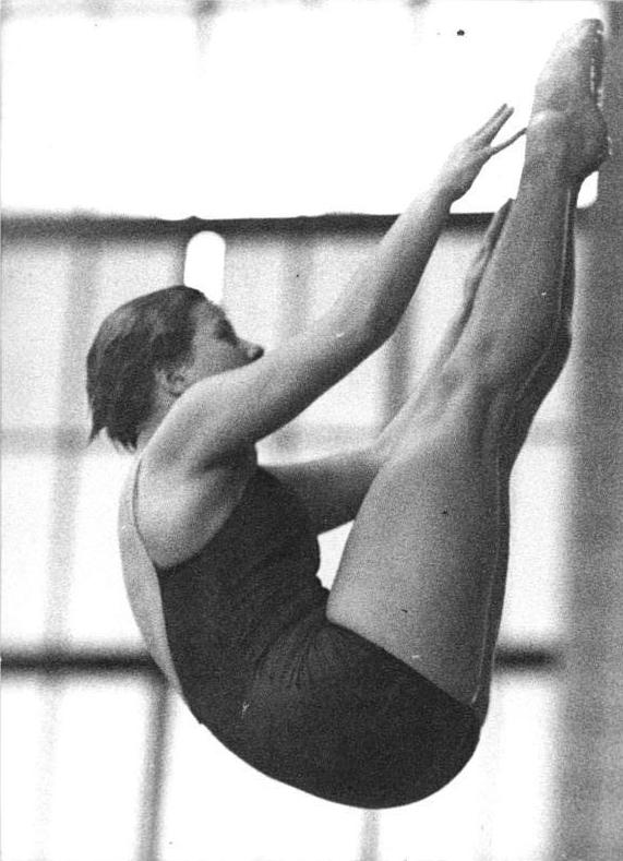 Zentralbild-Gößler Tr-Krz. 23.4.1961 Internationaler Springertag in Rostock. Die Kunst- und Turmspringer treffen sich an diesem Wochenende in der Rostocker Neptun-Schwimmhalle beim Internationalen Springertag. Die gesamte DRR-Elite, angeführt von der zweifachen Goldmedaillengewinnerin, Ingrid Krämer, ist dabei. Ausserdem gehen Springer aus Großbritannien, Dänemark und der CSSR an den Start. UBz: Im Turmspringen der Damen siegte erwartungsgemäß am 22.4.1961 Ingrid Krämer.